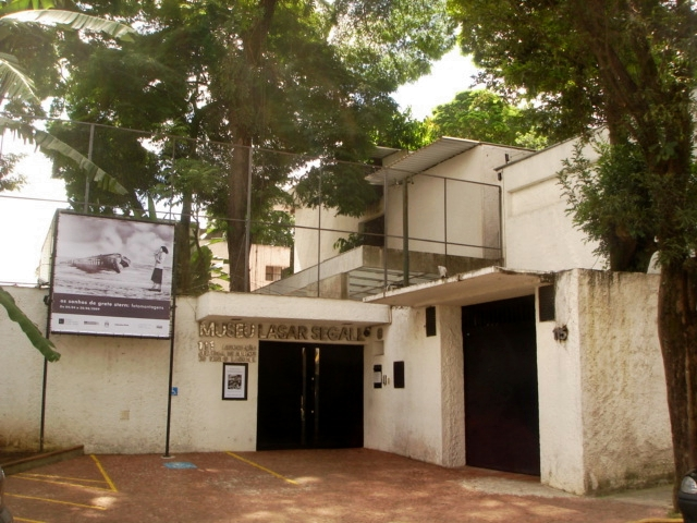 Fachada do museu Lasar Segall